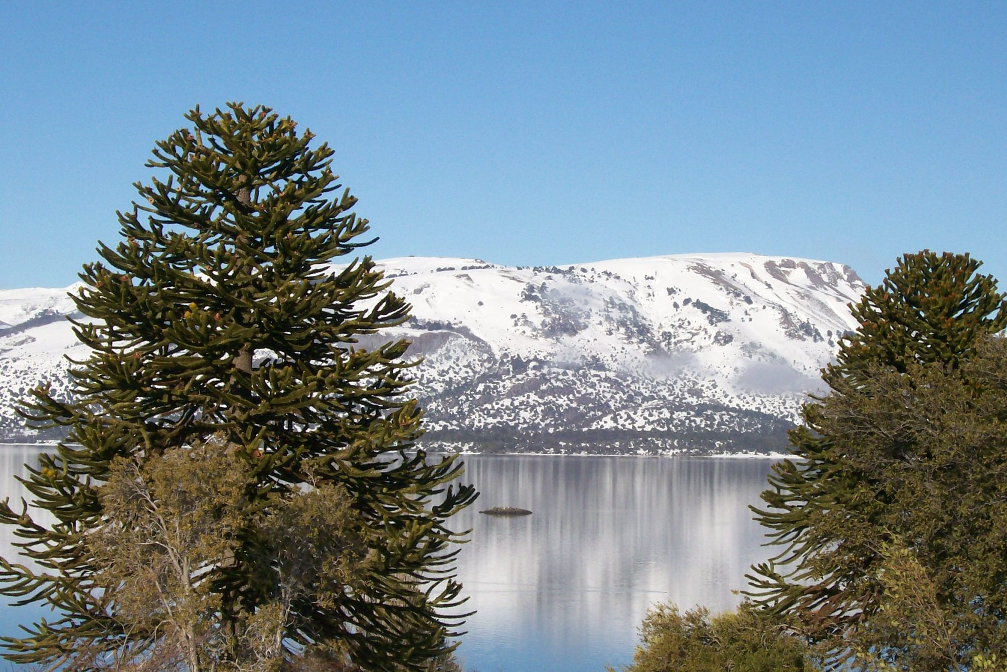 en Villa Pehuenia, Neuquén, Argentina